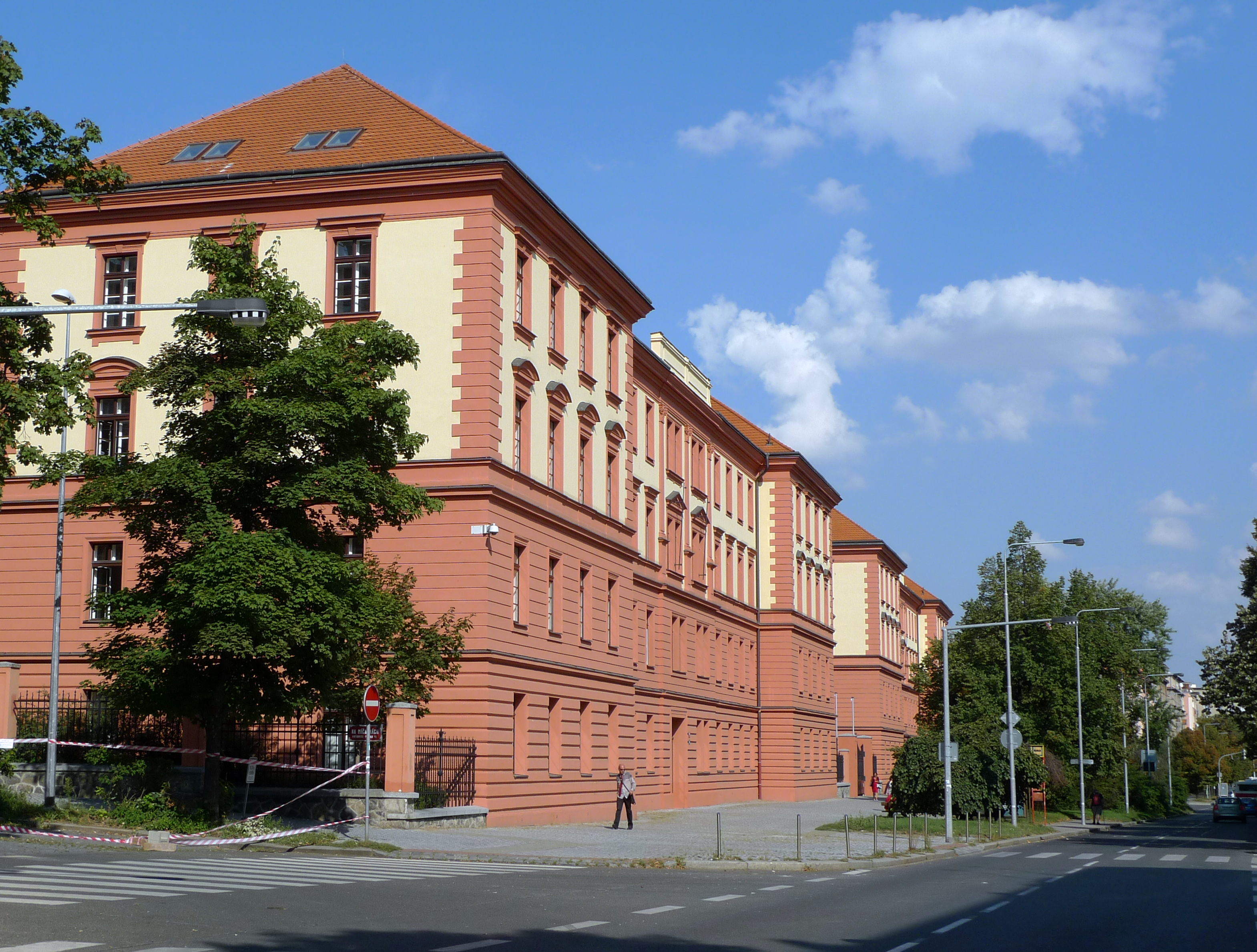 Justiční areál Na Míčánkách v Praze 10